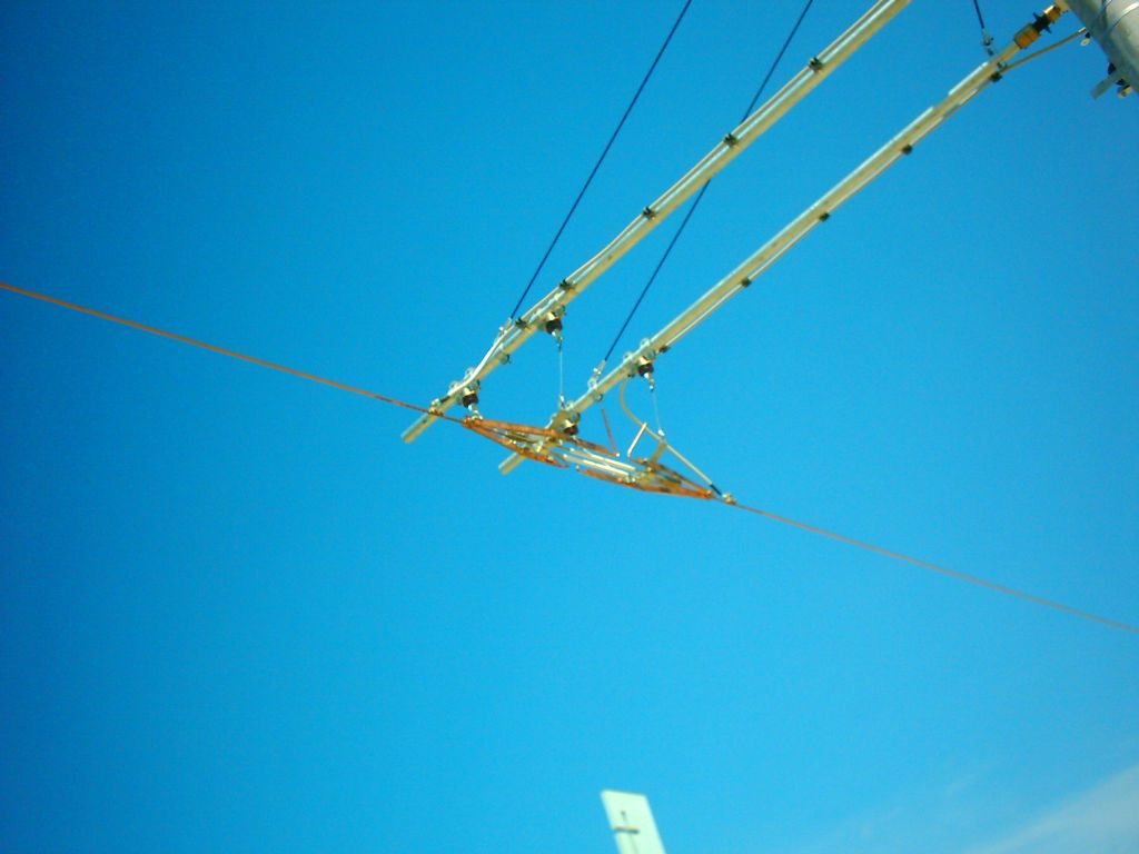 Rasklopac na strani tramvajske naponske mreže (zračni vod) .